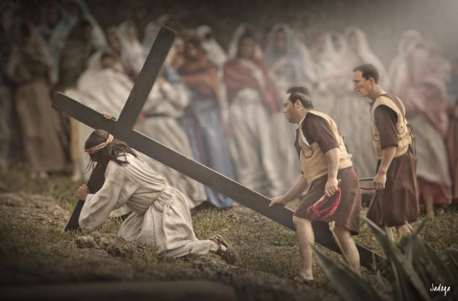 Escena de una de las caídas de "El Paso de Riogordo"